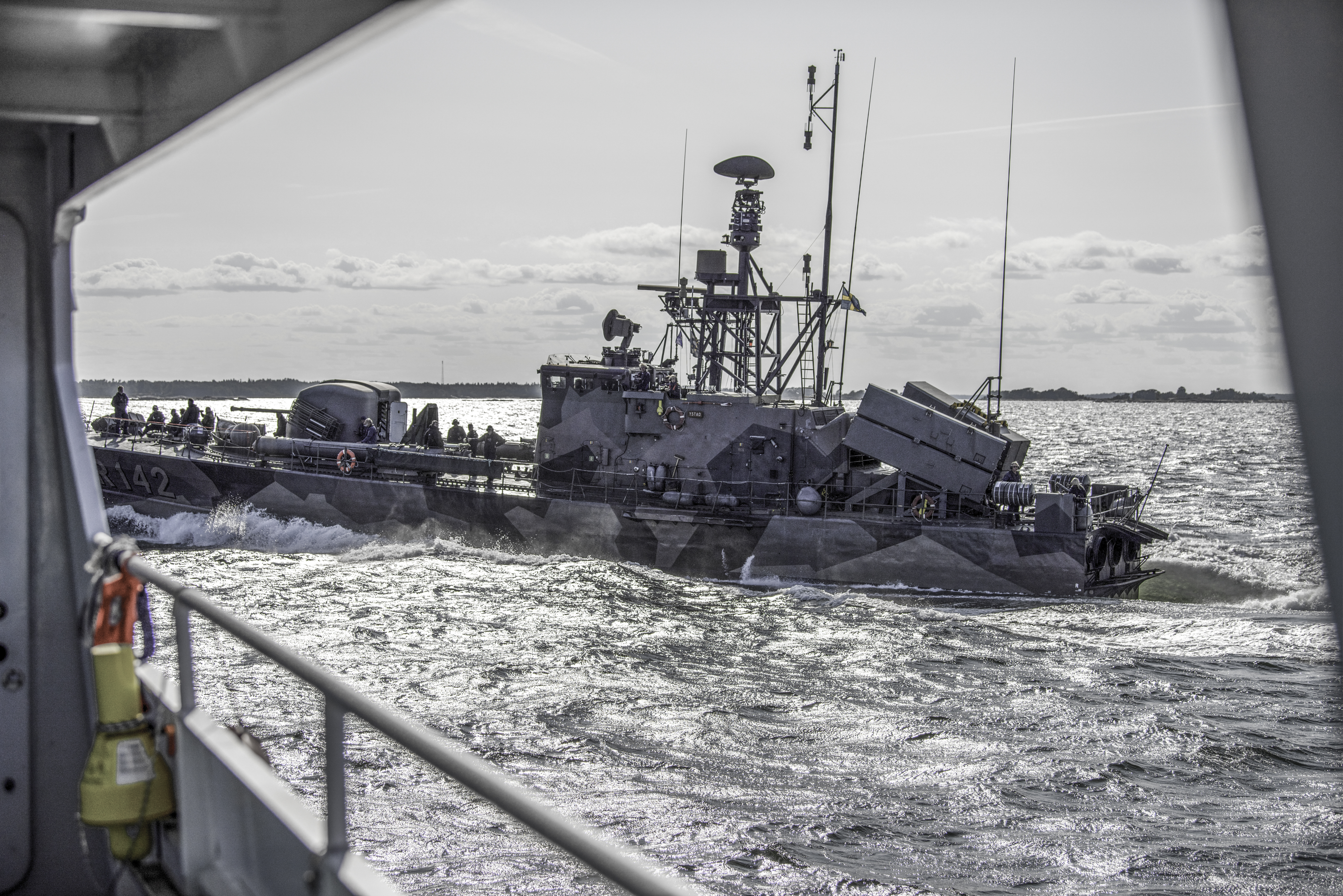 Arholma-Rödlöga-Vaxholm, Sweden, August 2019